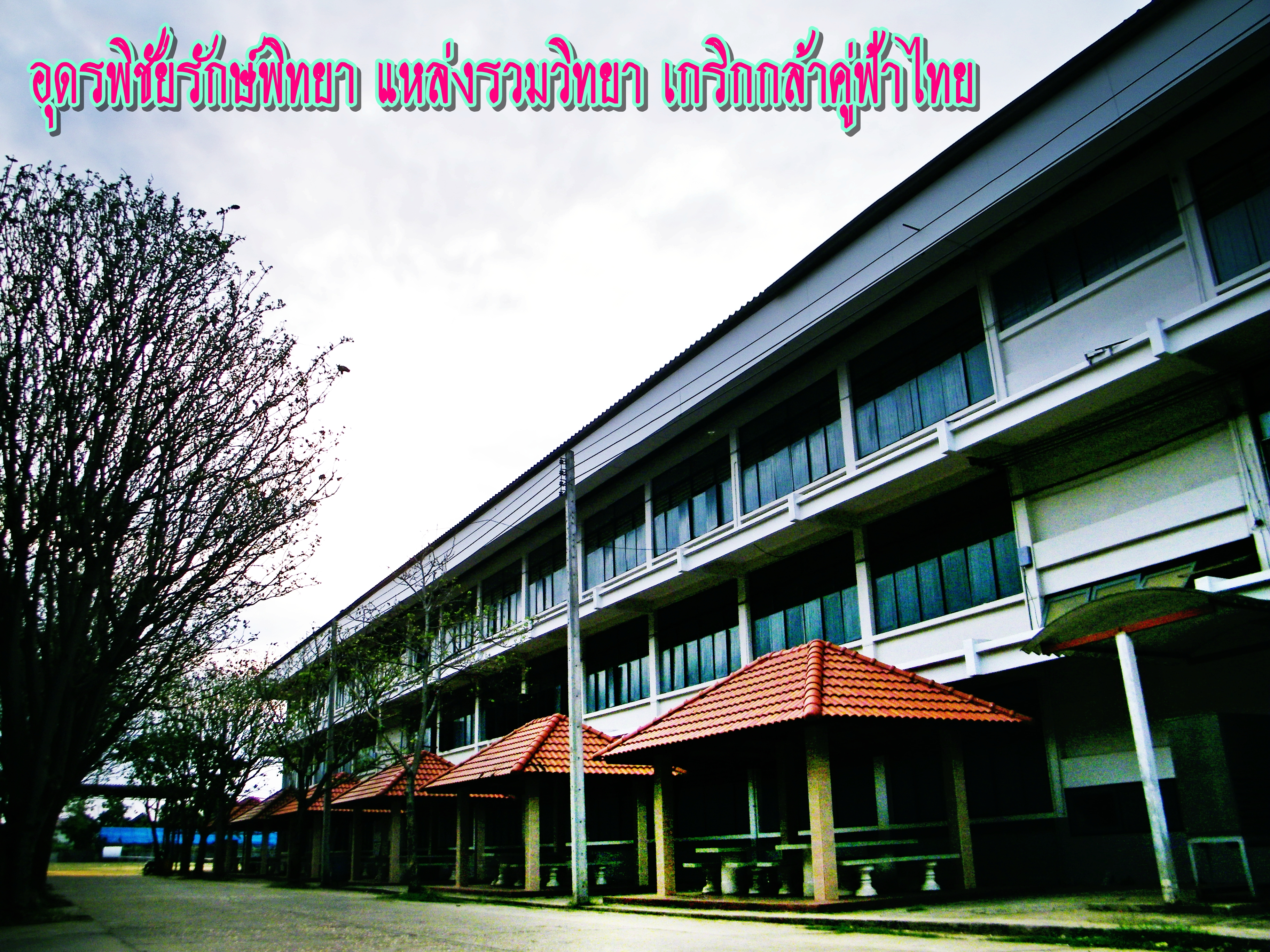 โรงเรียนอุดรพิชัยรักษ์พิทยา อ.เมือง จ.อุดรธานี